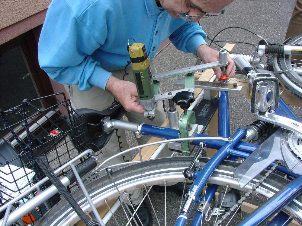 Gravurgerät der Firma Kirschbaum (Kirba). Der im Schablonenhalter gesteckte Code wird im Storchenschnabelverfahren verkleinert auf das Sattelrohr eingraviert und anschließend die Gravur mit einer Schutzfolie vor Korrosion geschützt.